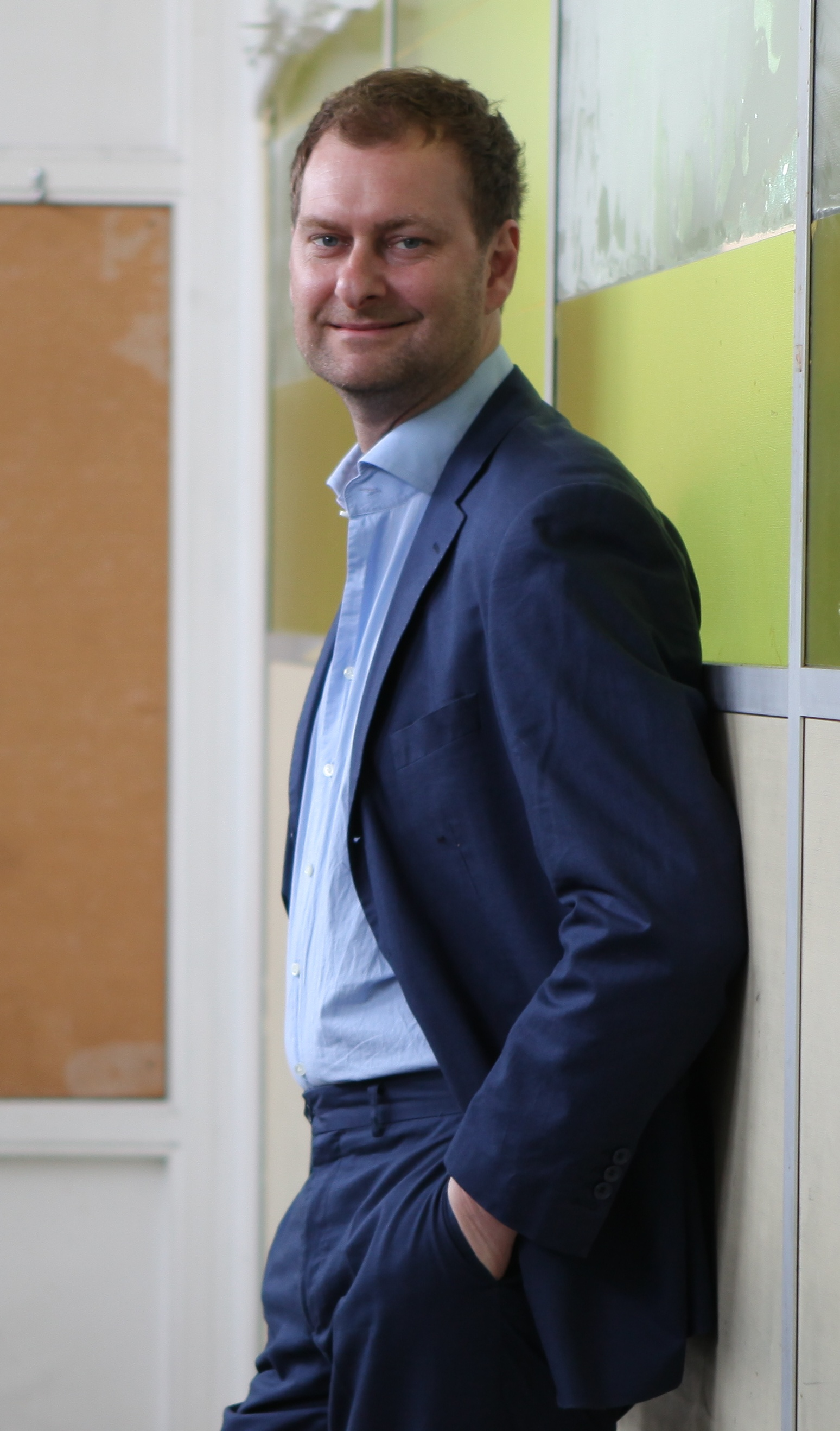 Alexander Jagsch, österreichischer Schauspieler. Fotoshooting mit Marco Zimprich